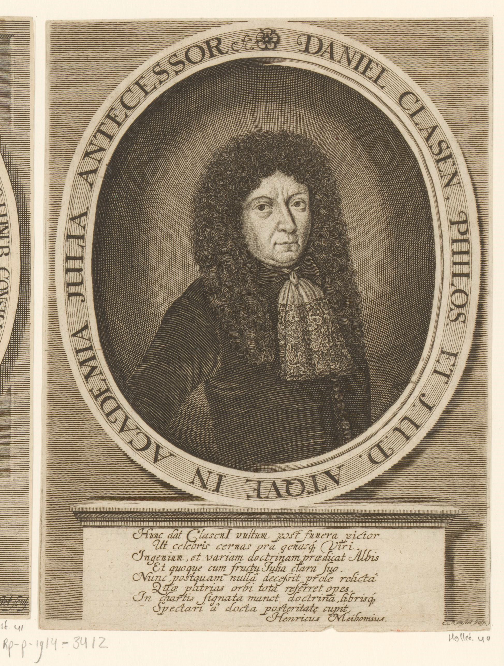 IdentificatieTitel(s): Portret van Daniel ClasenObjecttype: prent Objectnummer: RP-P-1914-3412Catalogusreferentie: Hollstein German 40Opschriften / Merken: verzamelaarsmerk, verso, gestempeld: Lugt 2228VervaardigingVervaardiger: prentmaker: Christian Romstet (vermeld op object)schrijver: Heinrich Meibom (vermeld op object)Datering: 1665 - 1685Fysieke kenmerken: gravureMateriaal: papier Techniek: graveren (drukprocedé)Afmetingen: blad: h 202 mm (binnen de plaatrand afgesneden) × b 148 mm (binnen de plaatrand afgesneden)ToelichtingPrent ook gebruikt in: Clasen, Daniel. Commentarius in Constitutiones criminales Caroli V. Imperatoris (...). Frankfurt am Main: Friedrich Lüderwald, 1685.OnderwerpWat: historical personsWie: Daniel ClasenVerwerving en rechtenVerwerving: aankoop 1905Copyright: Publiek domein